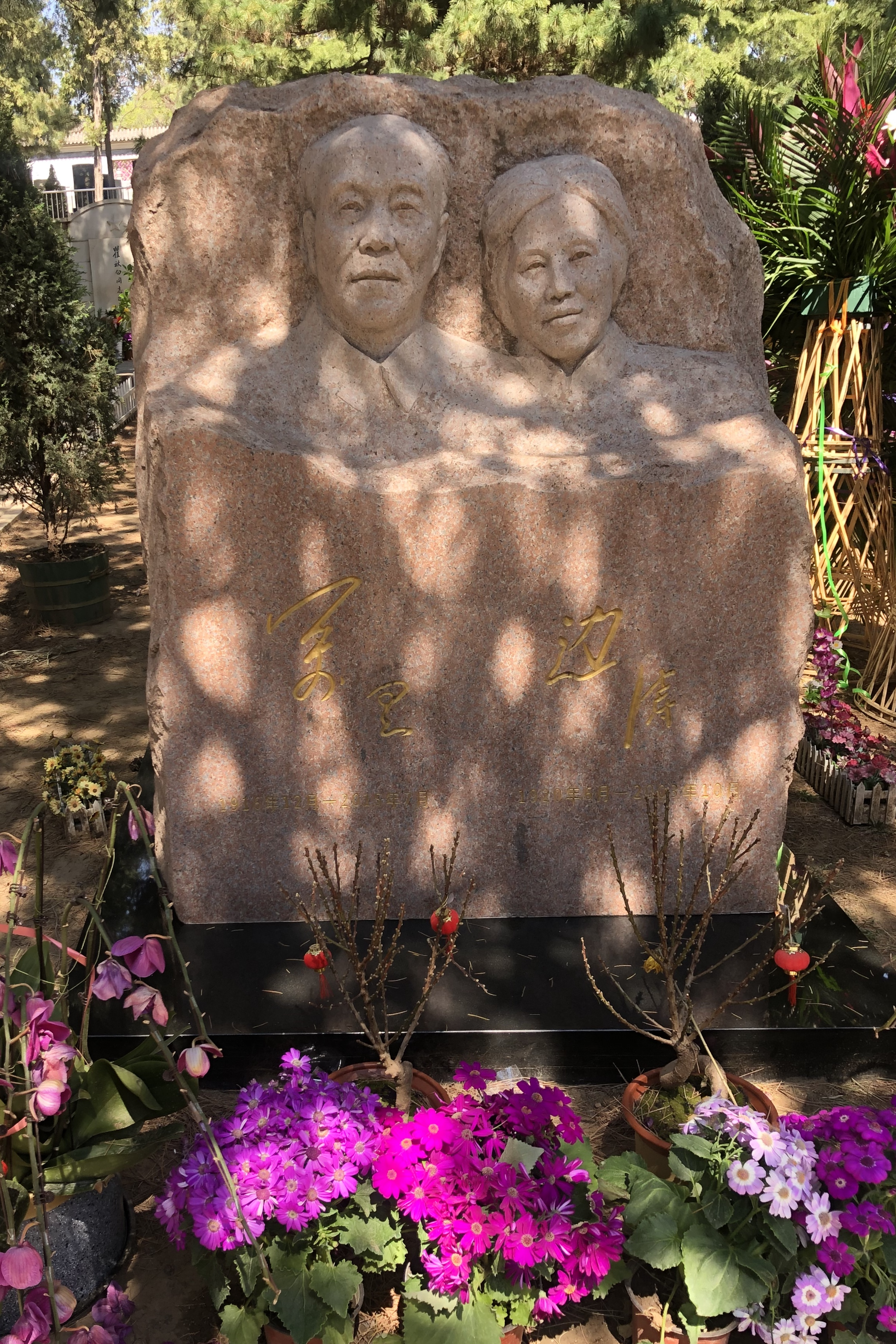 万里之墓，位于北京八宝山革命公墓。万里，中华人民共和国第5任人民代表大会常务委员会委员长，被视为『改革开放』政策的重要支持者，也是邓小平主政时期的「中共八大元老」之一。